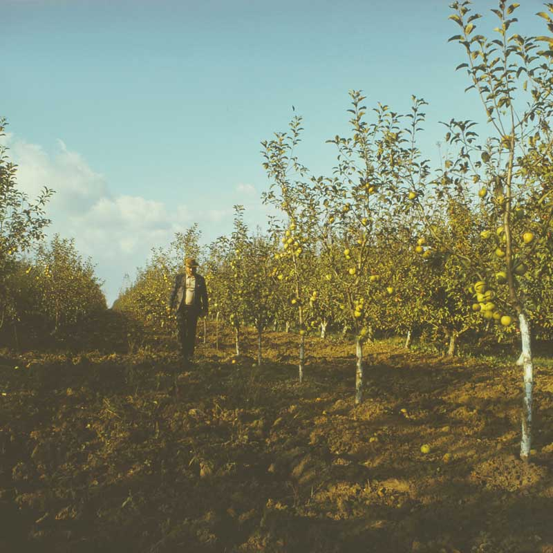 Sascani village, Nisporeni district, Moldova.